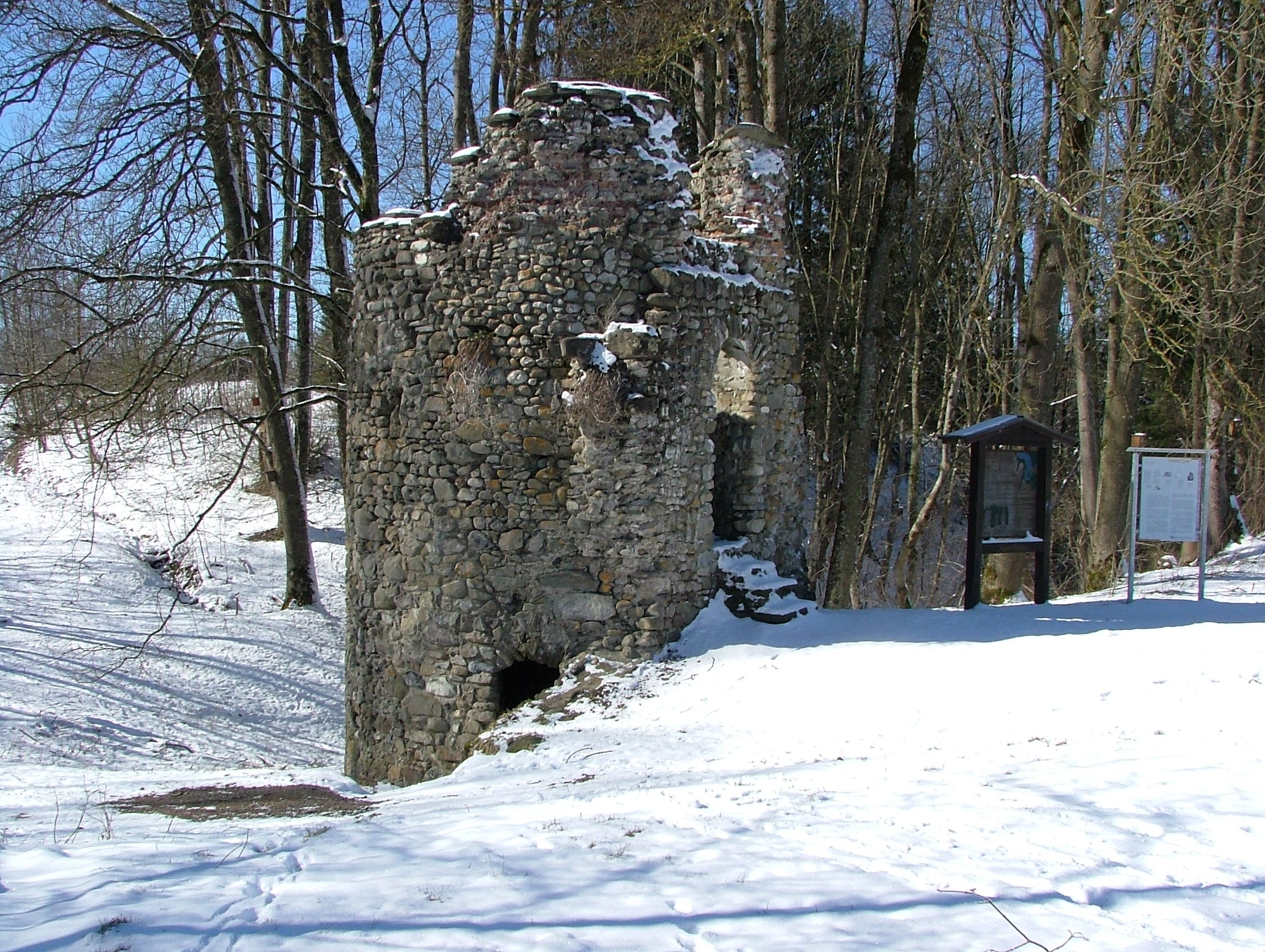 Ruine Kalden